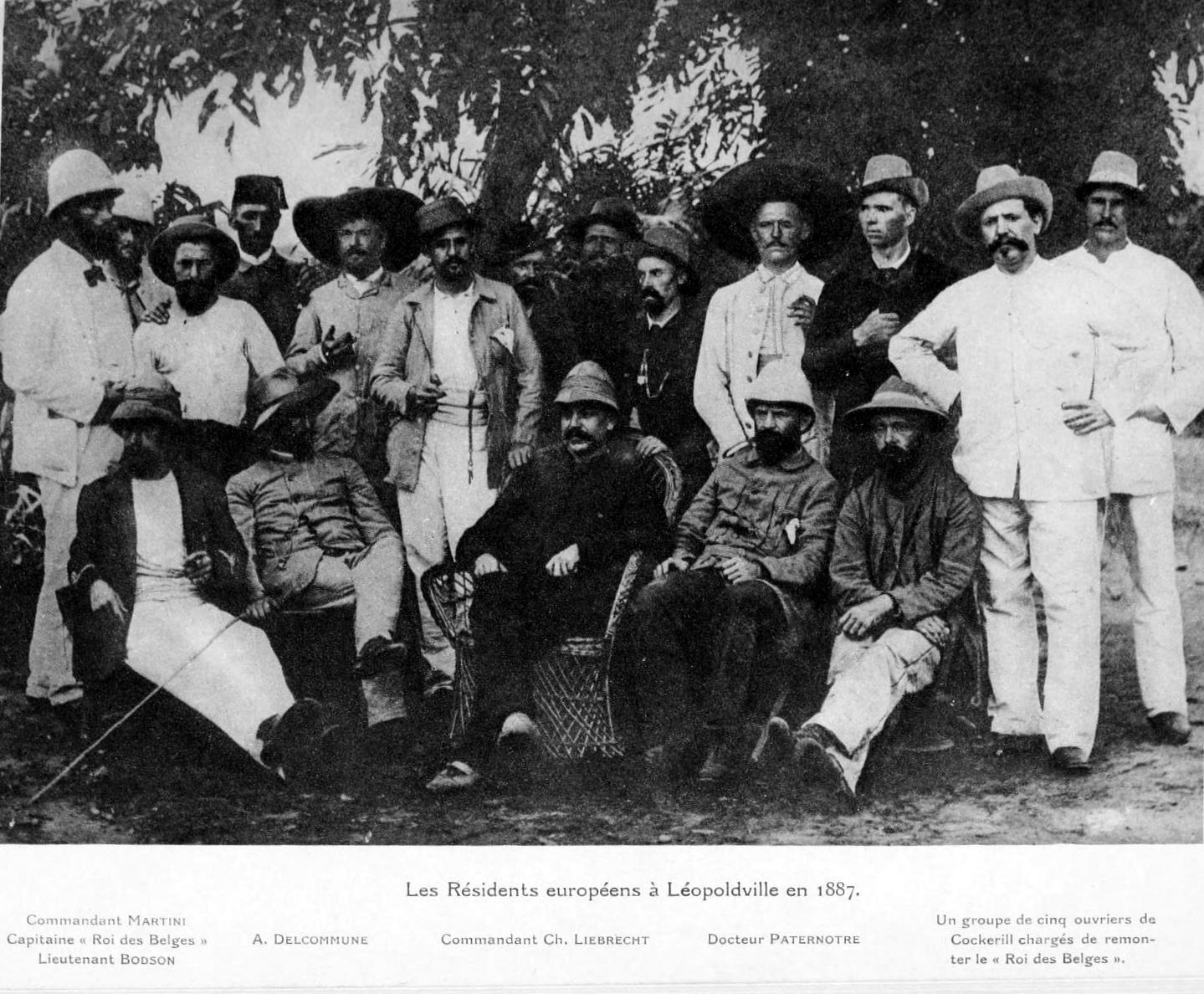 Les Résidents européens à Léopoldville en 1887 - p. 210